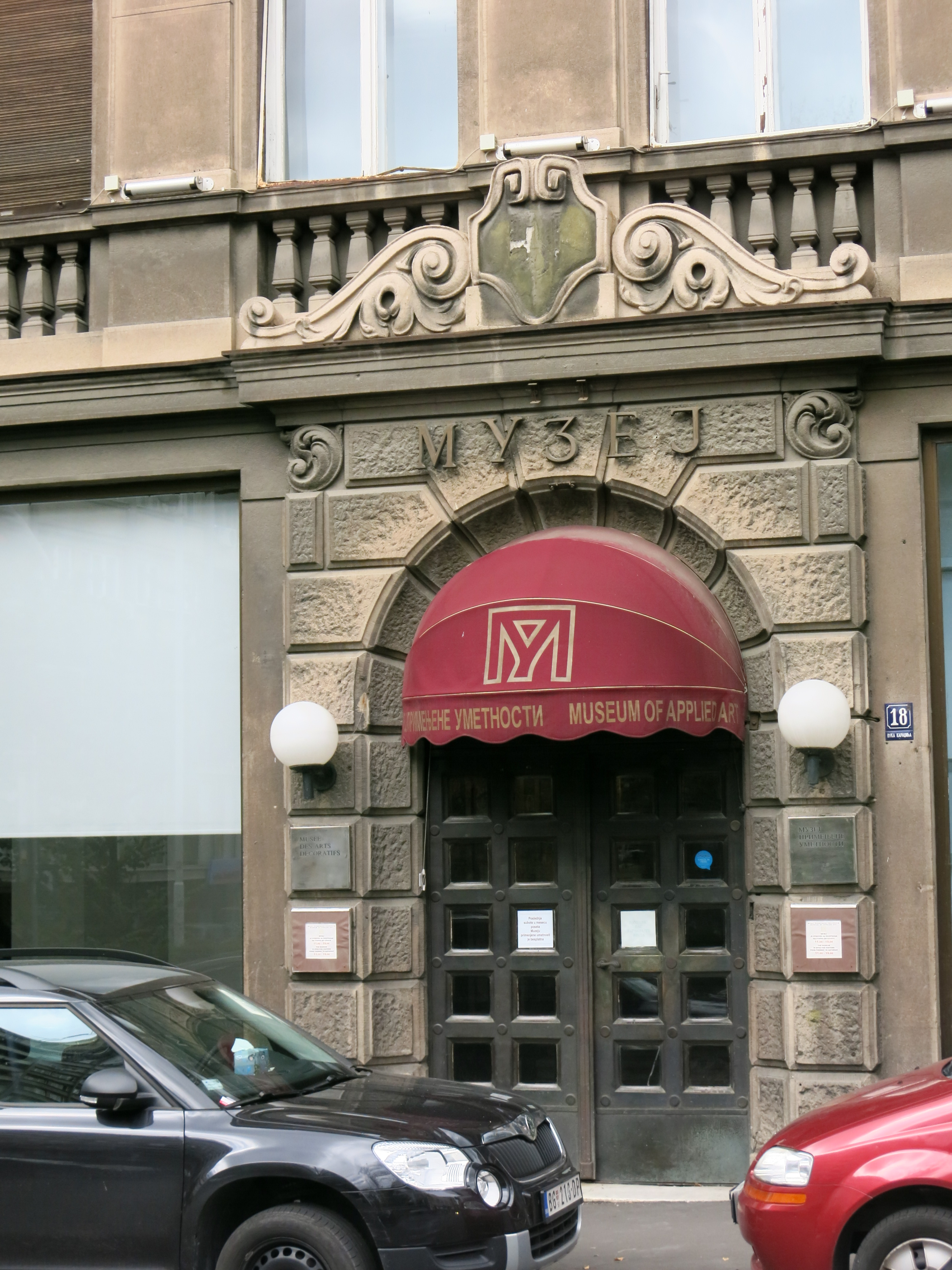 Зграда Јакова Челебоновића